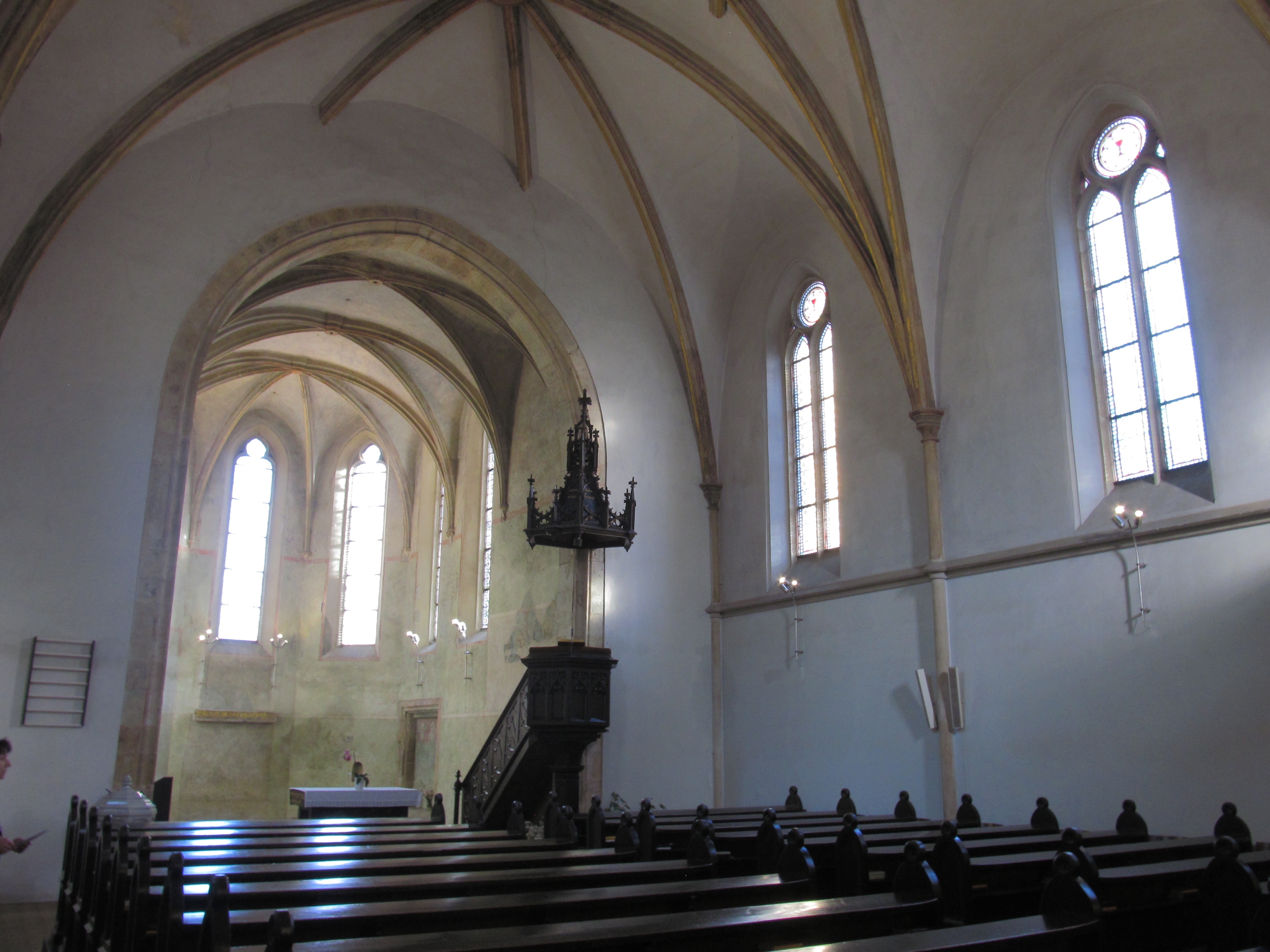 Interiér kostela sv. Kliementa, Nové Město v Praze. Noc kostelů 2016.